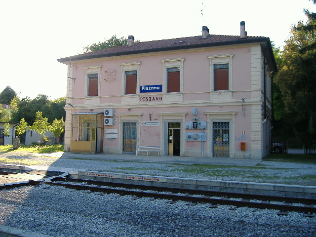 Stazione di Pinzano al Tagliamento. Lato ferrovia